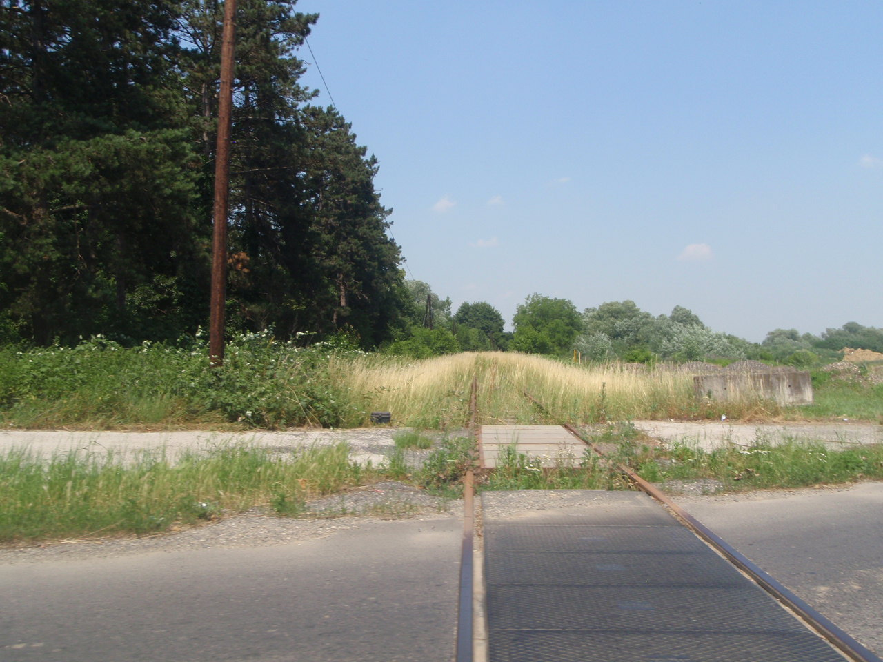 Körmend-Zalalövő vasútvonal használaton kívül 2013: 06